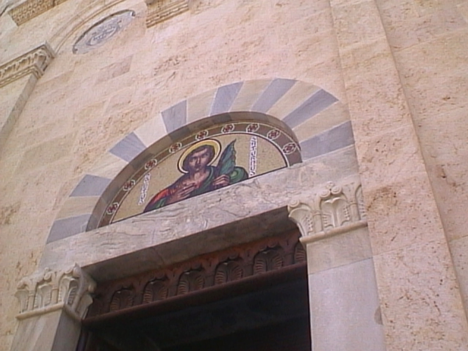 Portale sinistro, cattedrale di Cagliari